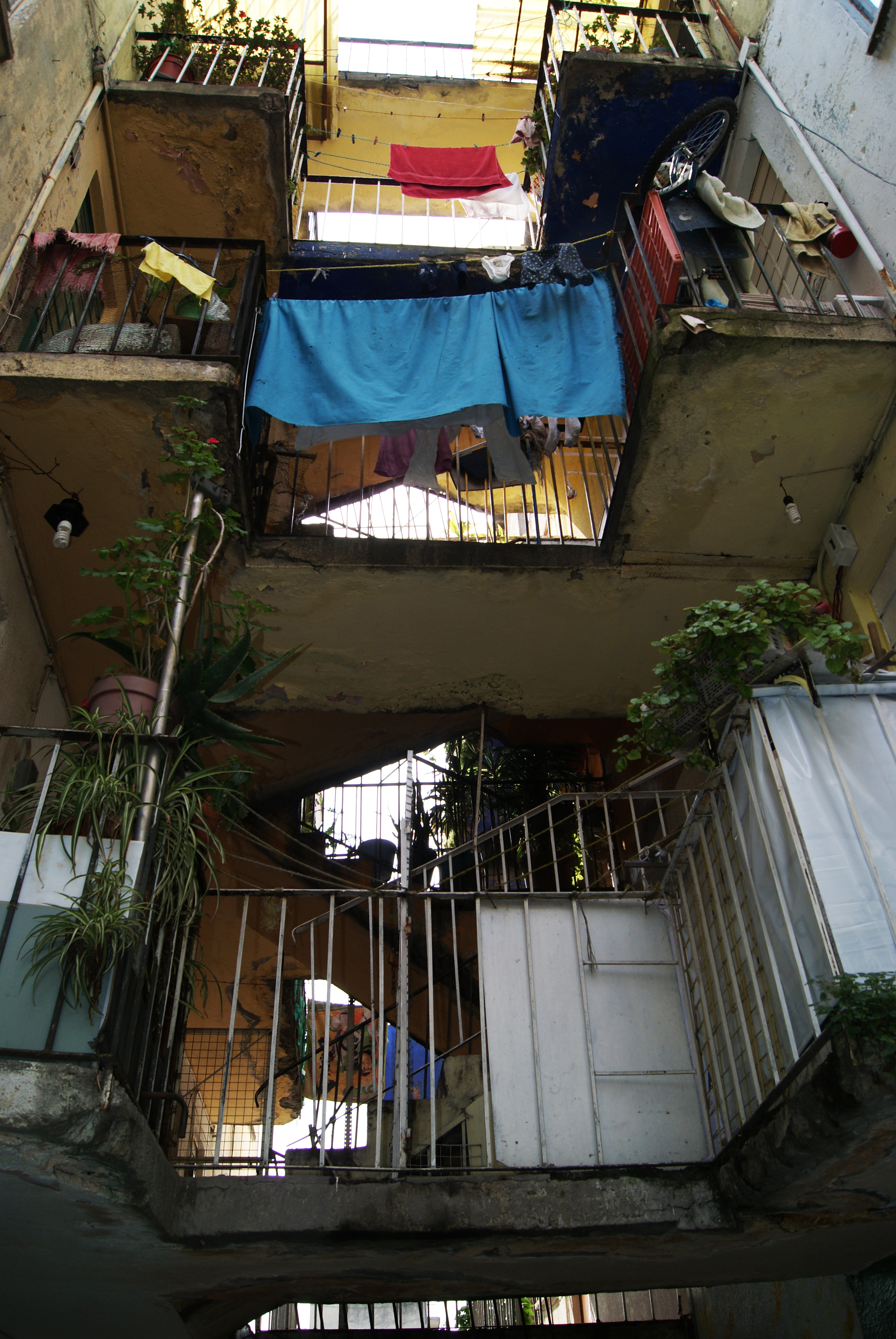 no solo el publico de clase alta tiene cabida en este concurso, aquí mostramos uno de los "infiernillos" o vecindades.